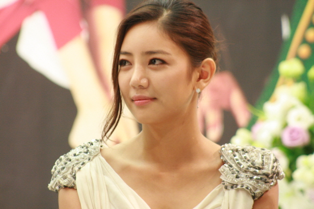 2010년 6월 15일 서울 대치동에 위치한 컨벤션 마벨러스에서 열린 KBS 주말드라마 《결혼해주세요》 제작발표회에 참석한 이태임.